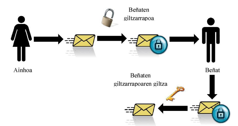 Asimetrikoa Analogia